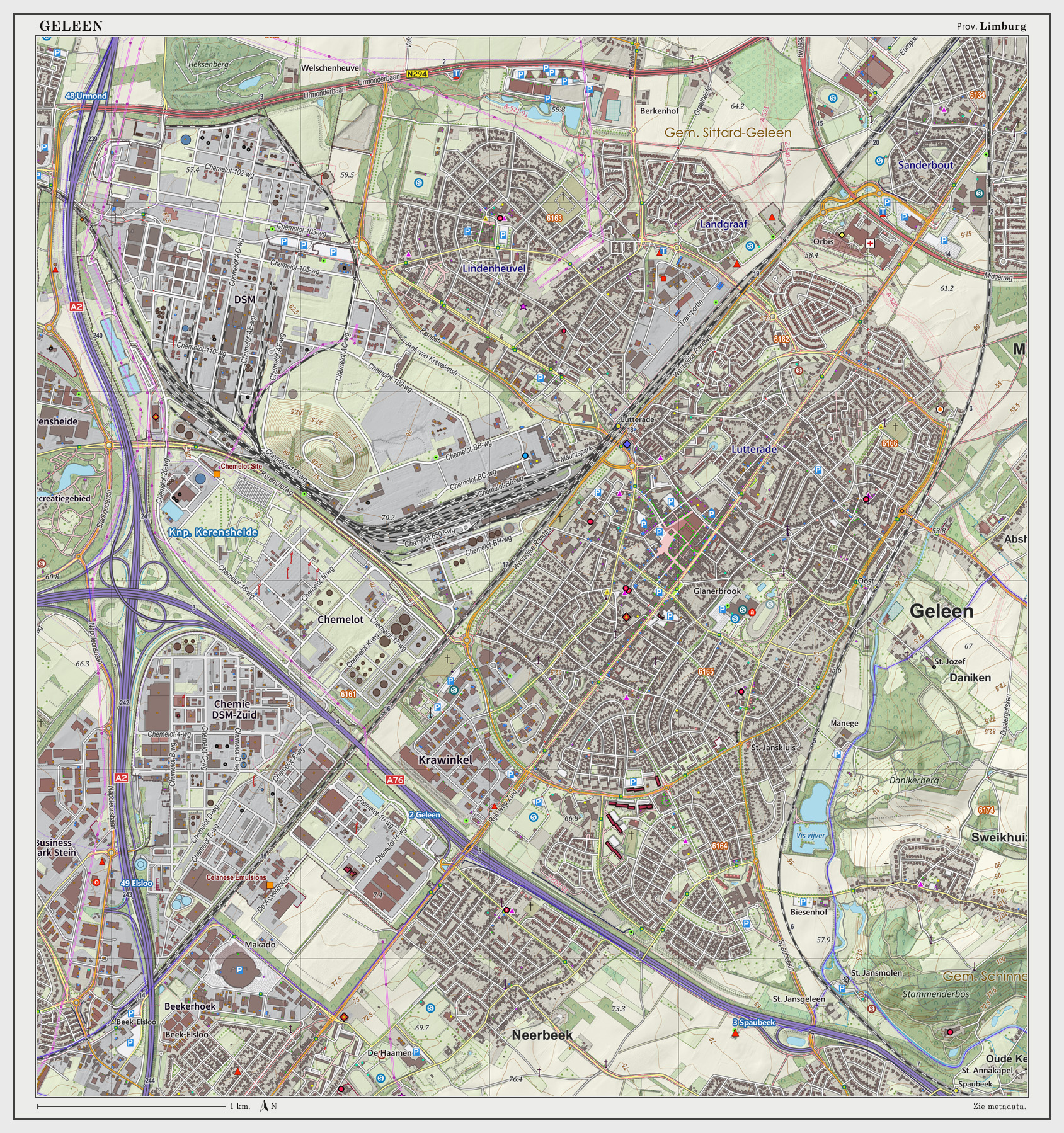 Topografische kaart van Geleen (woonplaats). Resolutie: 300 pixels/km. Kaartbeeld samengesteld uit de open geodata van de Top10NL en Top25namen (Basisregistratie Topografie, Kadaster), Creative Commons BY licentie. Gebouwvlakken uit open geodata BAG extract. Wegen uit de OpenStreetMap, OpenStreetMap community. Reliëfschaduw uit de Actuele Hoogtekaart AHN2. Samenstelling en kleurenschema: Jan-Willem van Aalst, met QGIS2. Zie ook de Legenda.